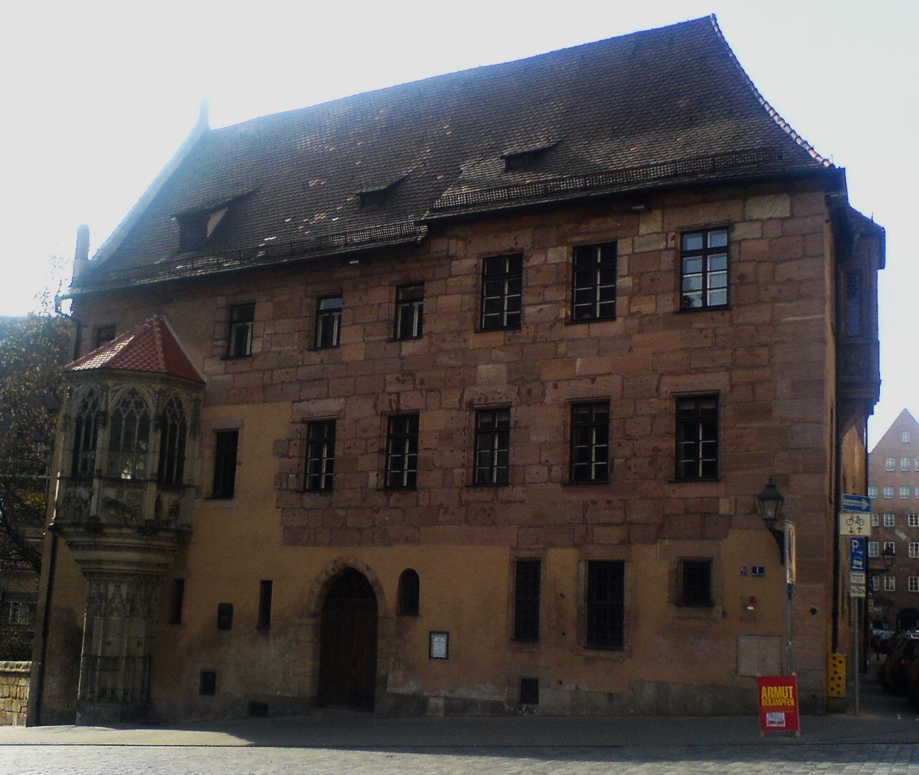 Sebalder Pfarrhof, Nuremberg, Germany